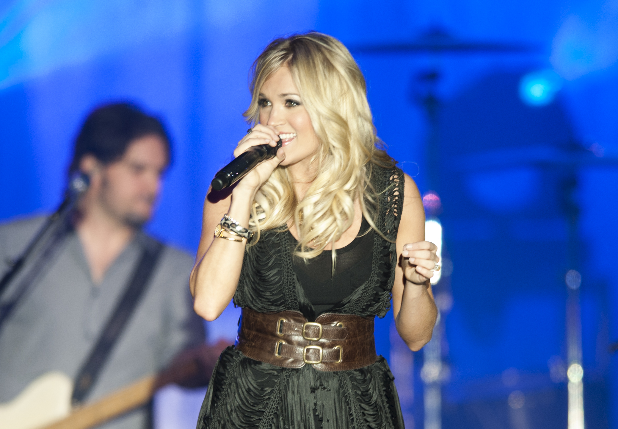 Carry Underwood_46